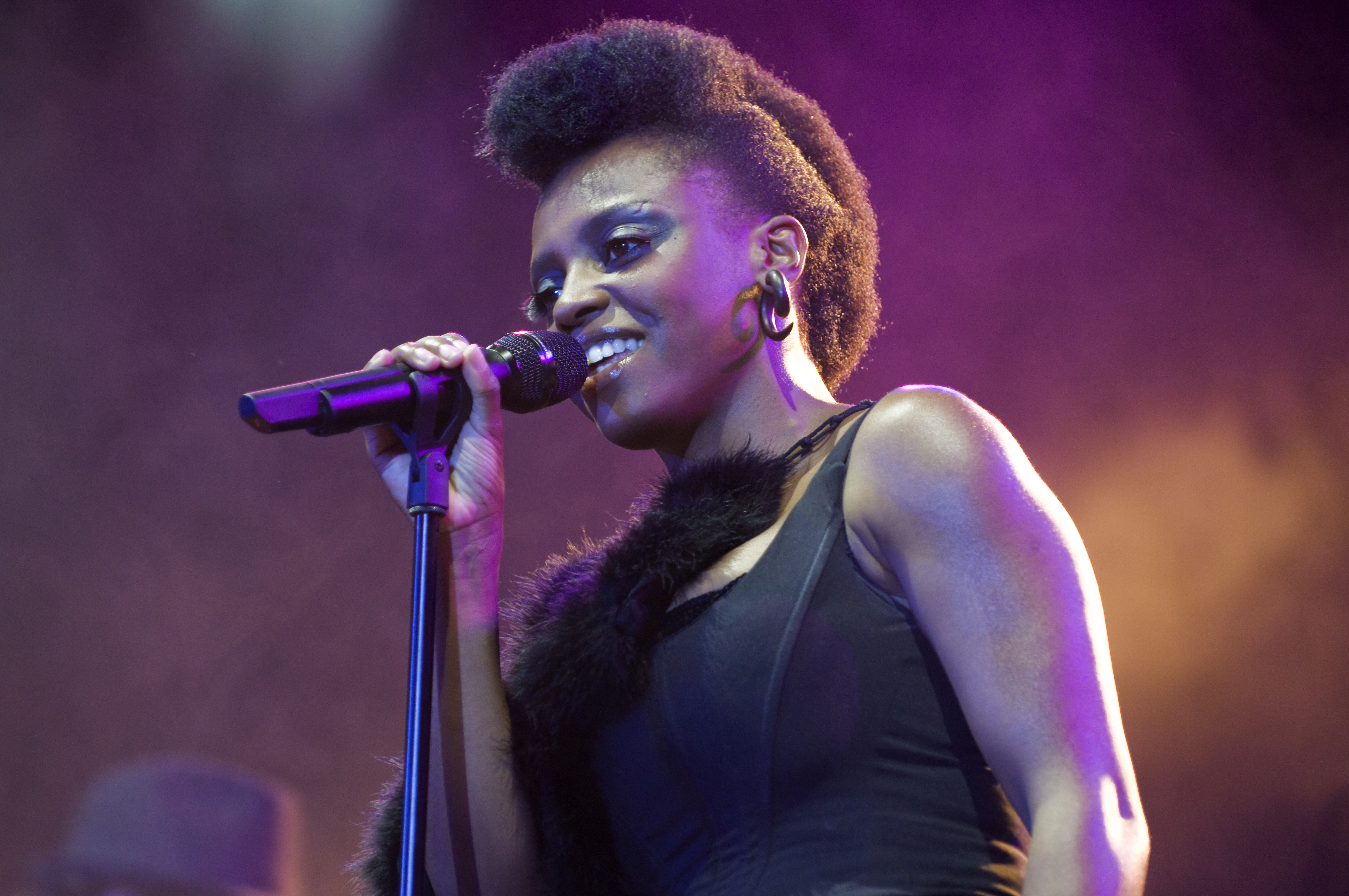 Skye Edwards